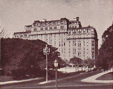 Vista del Alvear Palace Hotel, hotel de lujo en Buenos Aires, desde la Plaza Intendente Alvear en Recoleta.